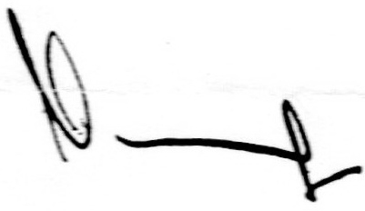 Подпись Н.Я. Азарова